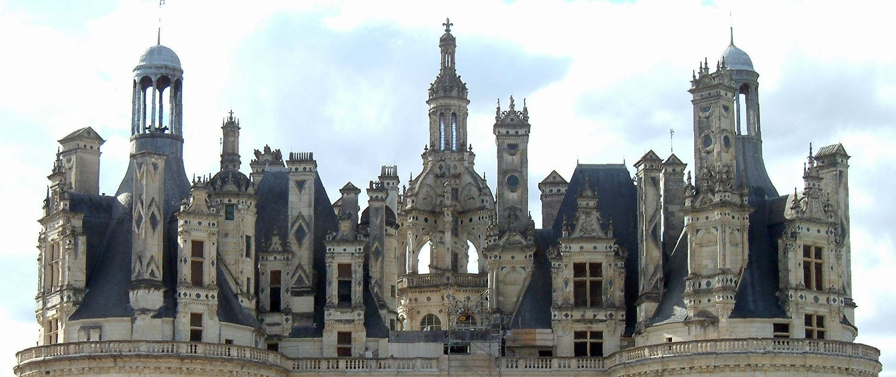 Château de Chambord, Chambord, FRANCE